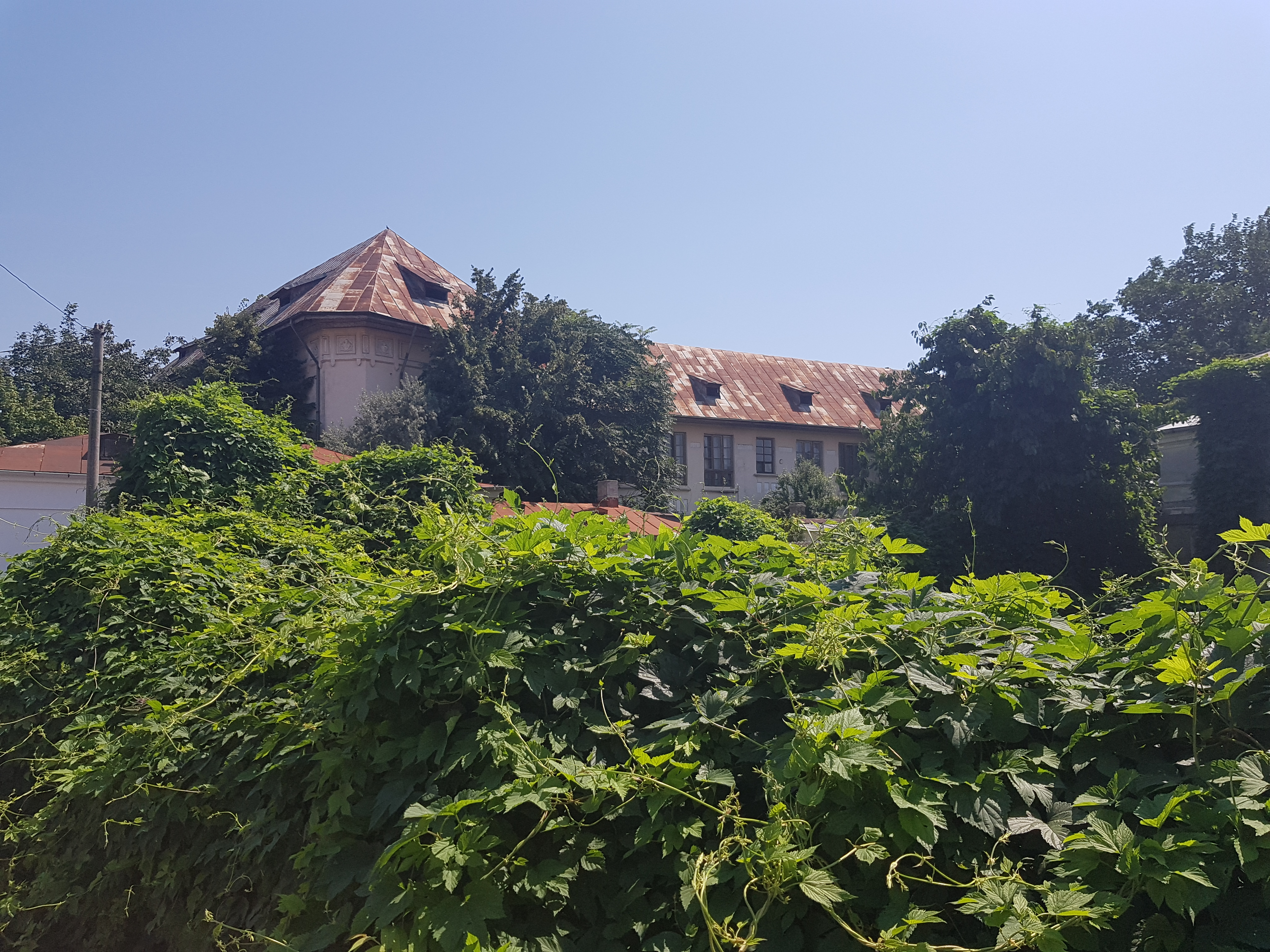 Școala comercială